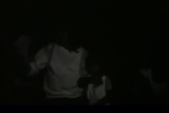 Rockdrigo González y su hija, Amanda Lalena (la futura "Amandititita"). Still de la película "Alex Lora: 20 años después" de Sergio García Michel. "'Alejandro Lora: Veinte años después' es un largometraje que trae escenas de cuando filmé 'Una larga experiencia' -con el Three Souls in my Mind-, ya que me sobró mucho material de aquella época; la película incluye otro material de Alejandro solo, cantando en La Curva; incluso hay unas escenas donde sale Rockdrigo -el día que Alejandro estuvo ahí, llegó él-, muy poquito sale, pero ahí se ve con mucha greña en aquel entonces; y también hay material con El Tri. O sea, es Three Souls, Lora solista y El Tri; es un documento de hora y media." (Fragmento de la entrevista titulada 'Un Toke de Roc y Una larga experiencia. Sergio García, un cineasta neto'. Por Gustavo "Oso" Munguía. Revista CONECTE 547)